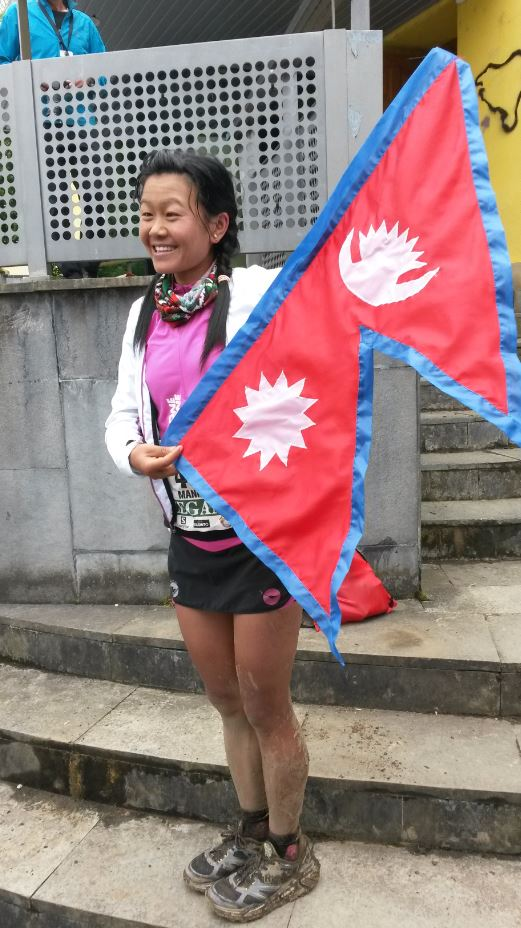 Manikala Rai à Zegama